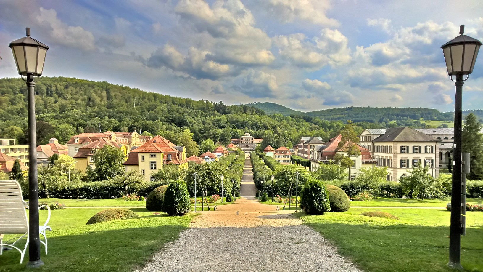 Blick vom Fürstenhof über den Kurpark des Staatsbades BrückenauThis is a photograph of an architectural monument.